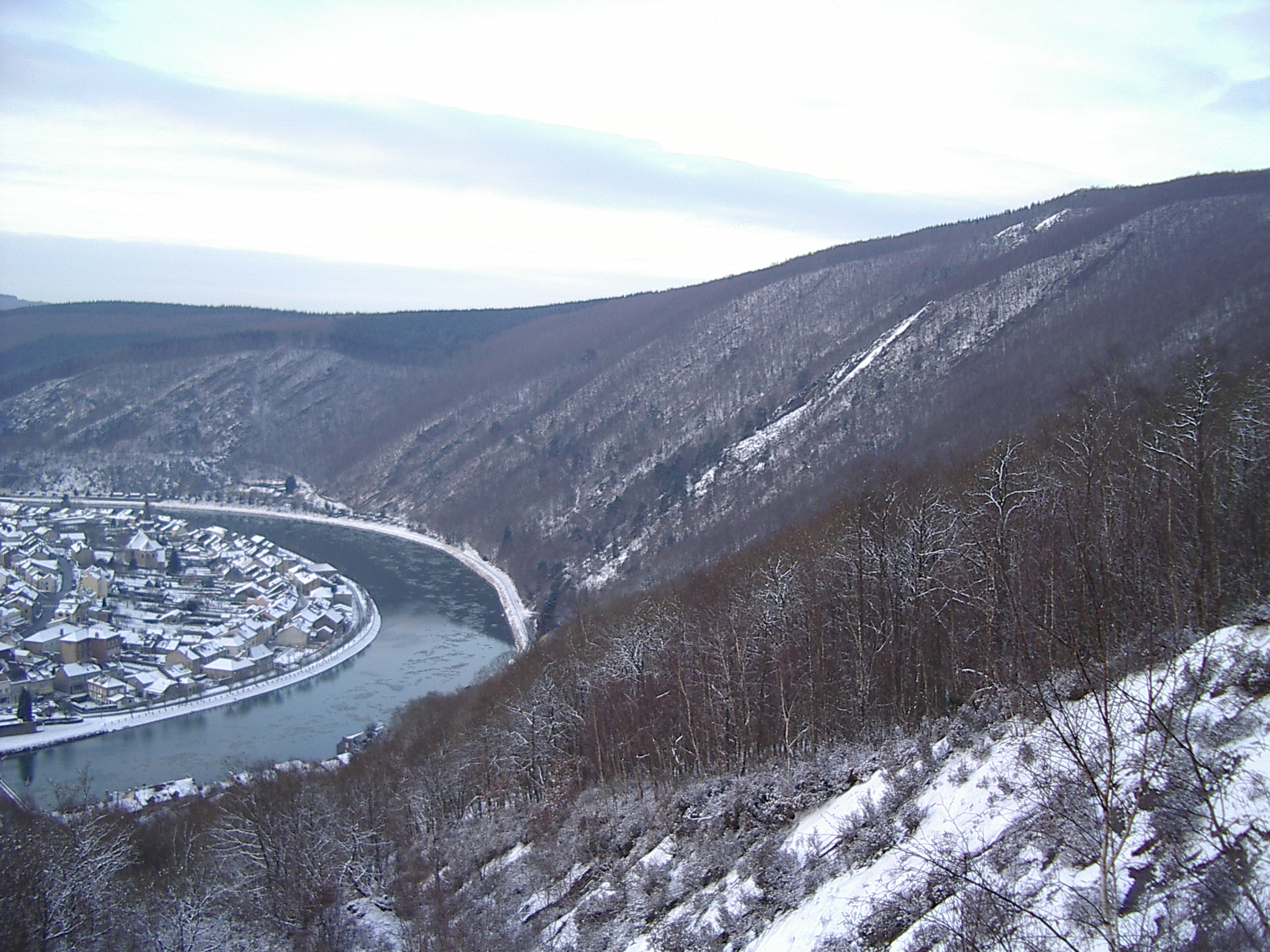 Monthermé 08800 Ardennes France Vue sous la neige